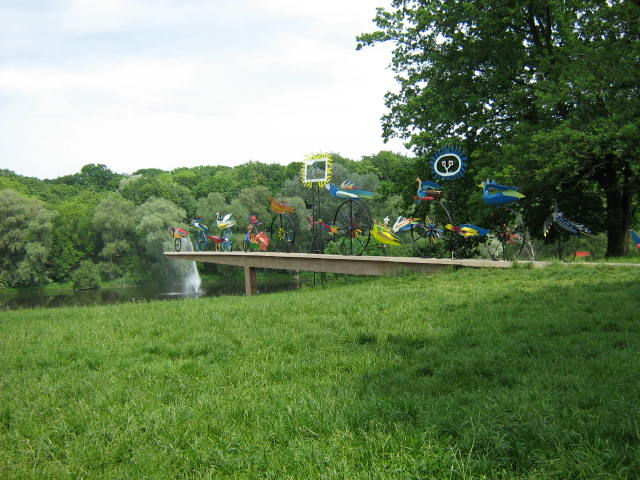 Ogniste ptaki w Szczecinie. Rzeźba plenerowa Władysława Hasiora w parku Kasprowicza